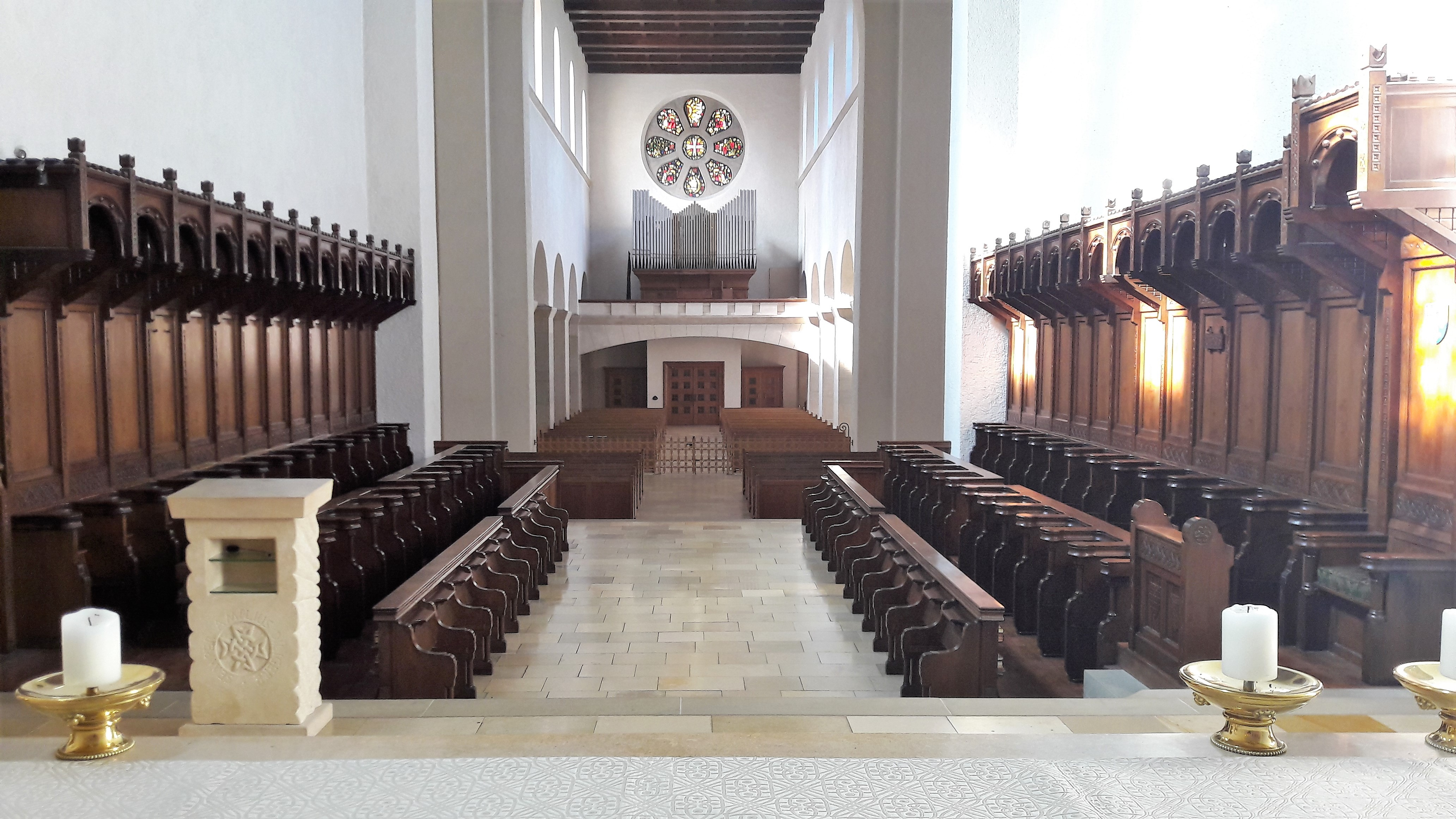 Bléck vum Altor an d'Haaptschëf vun der Benediktinerabteikierch zu Klierf